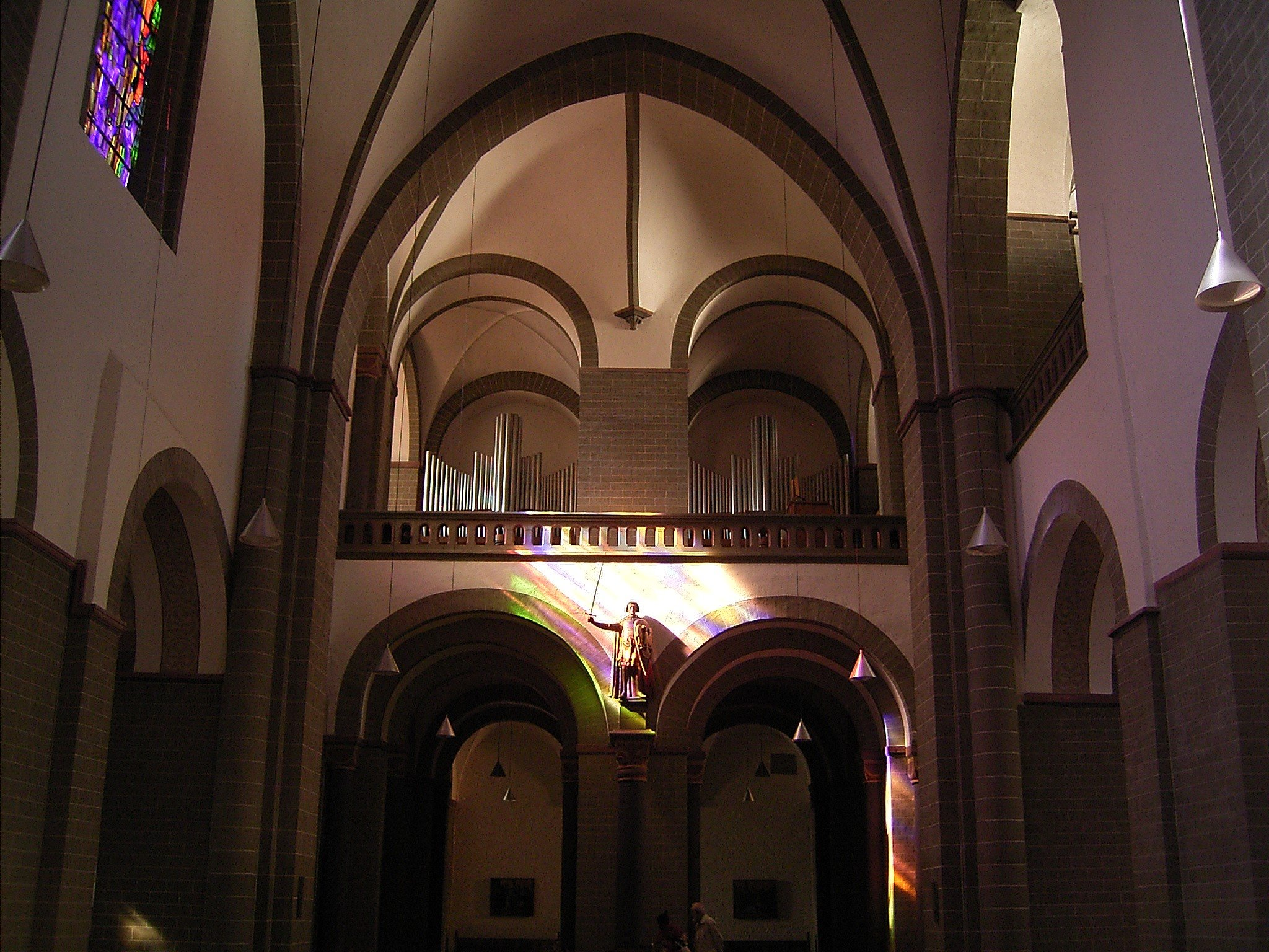 St. Patrokli-Dom in Soest